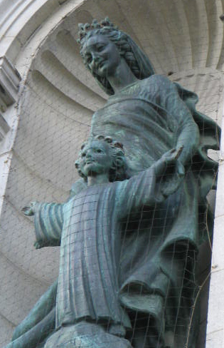 Statue de Brunet. Église Notre-Dame-de-Grâce de Montréal. Source Photographie prise le 31 août 2007 par Utilisateur:Duruf